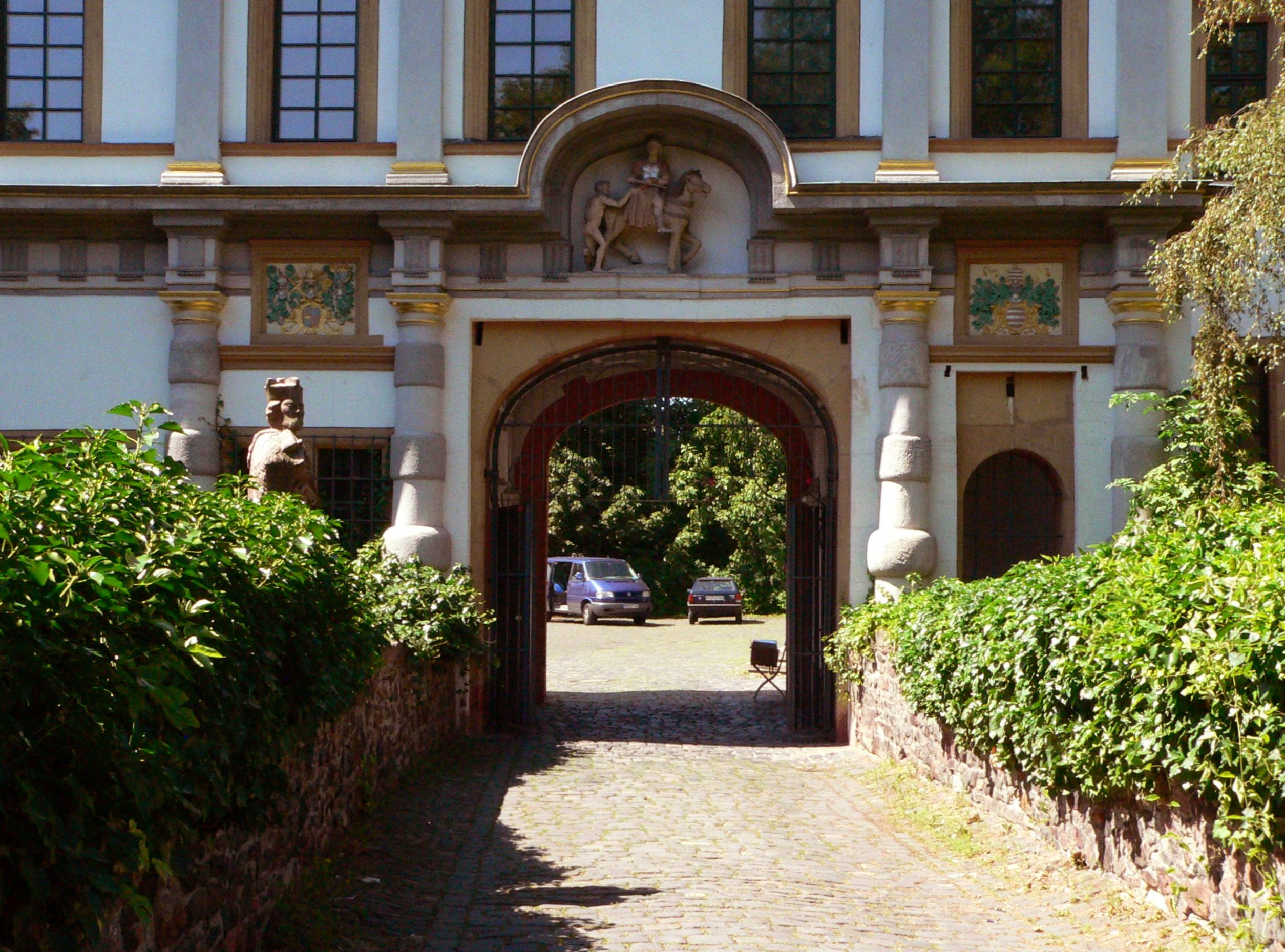 Eingangstor des Höchster Schlosses